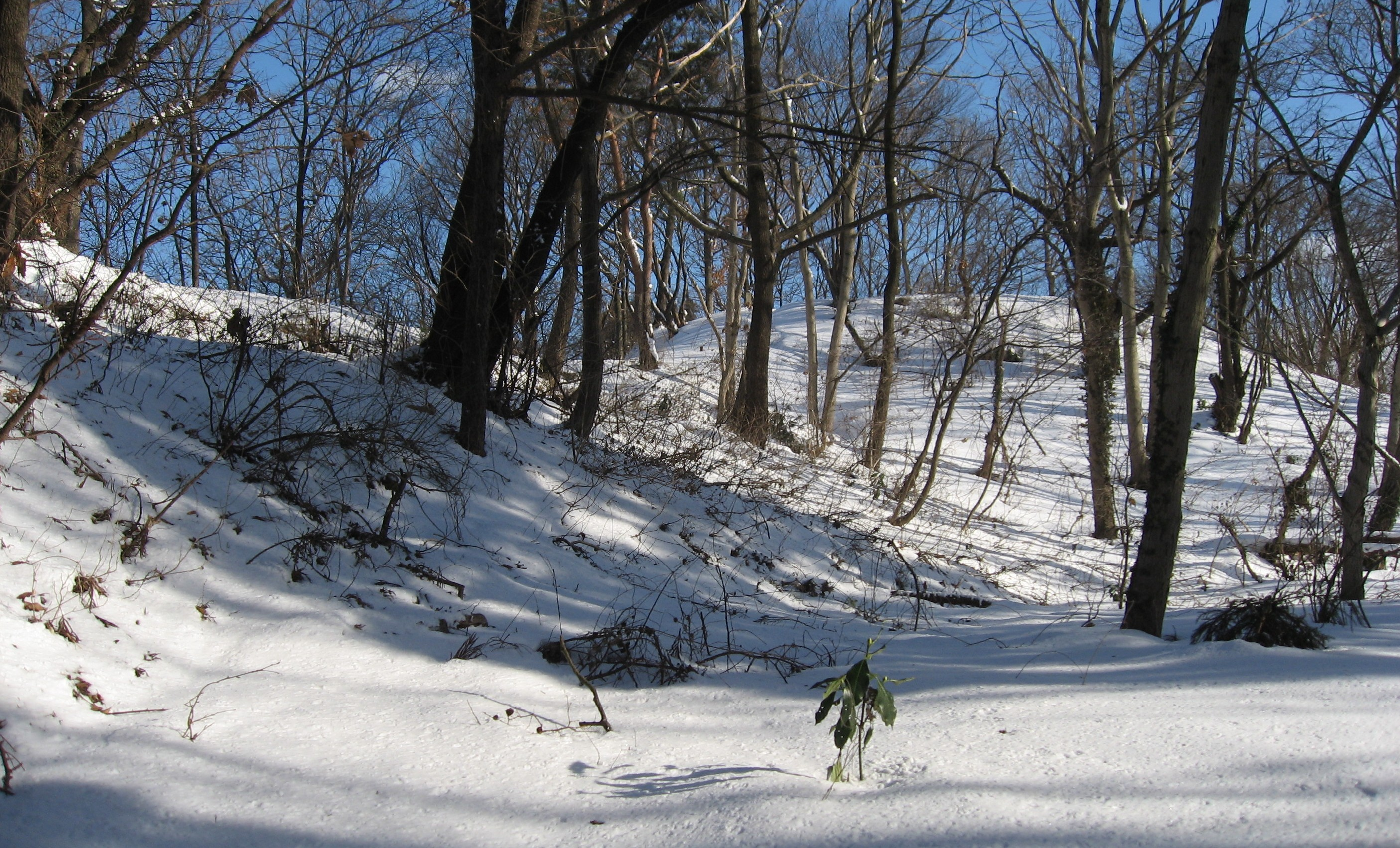 会津大塚山古墳 Ōtsukayama Kofun, Aizuwakamatsu, Fukushima, Japan